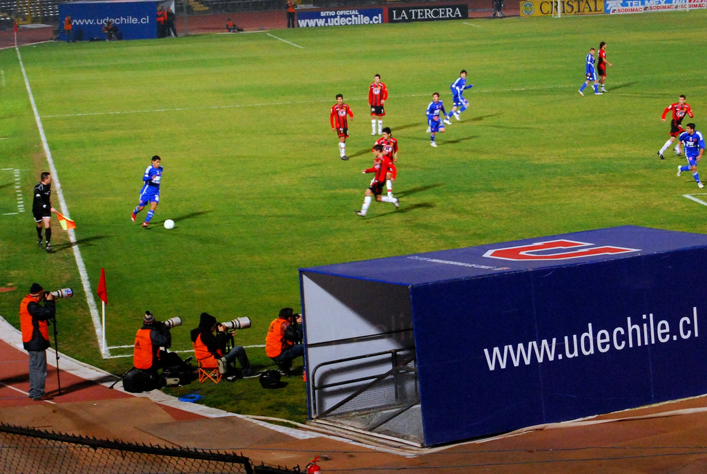 Universidad de Chile frente a Rengers de Talca en el Estadio Nacional de Chile en 2009